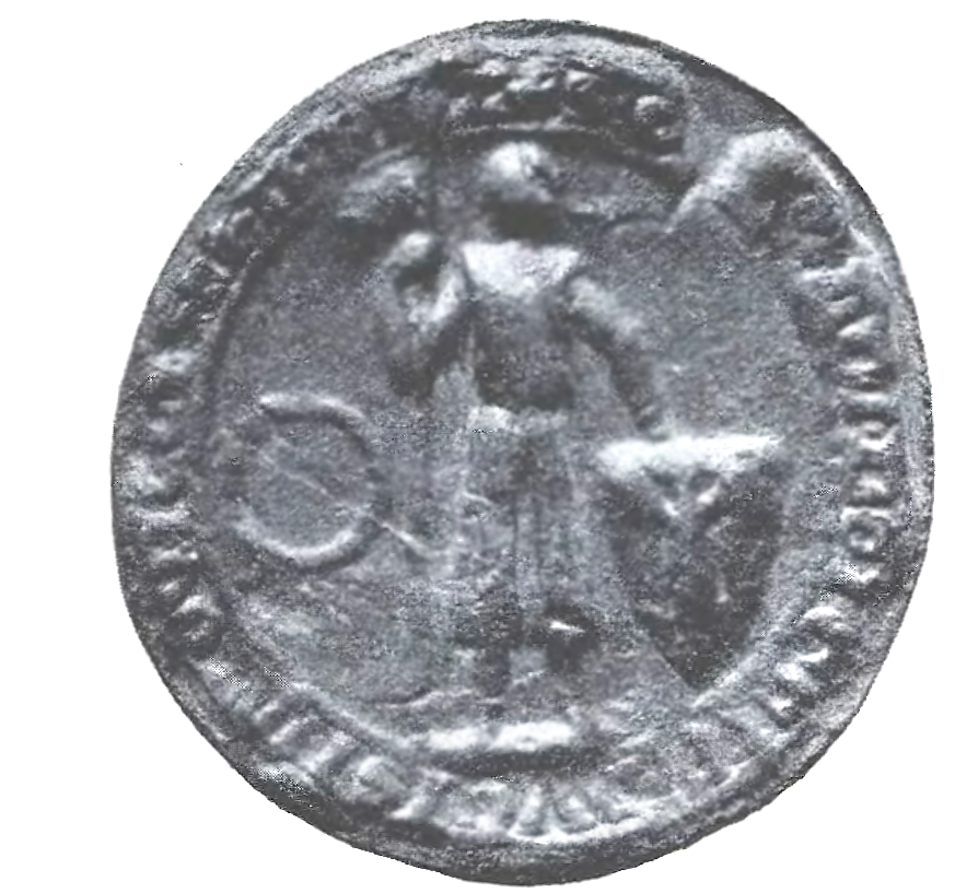 Konard II Czerski seal